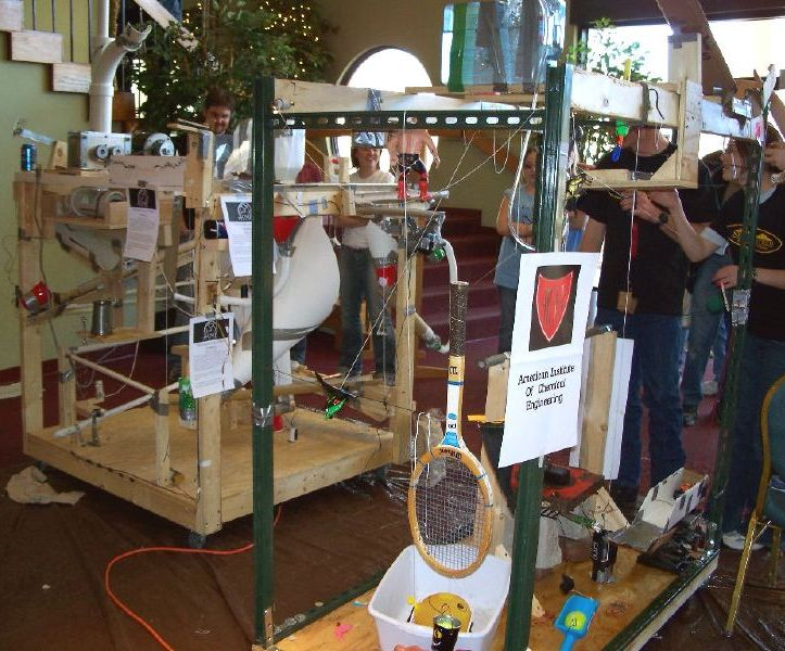 Rube Goldberg devices.